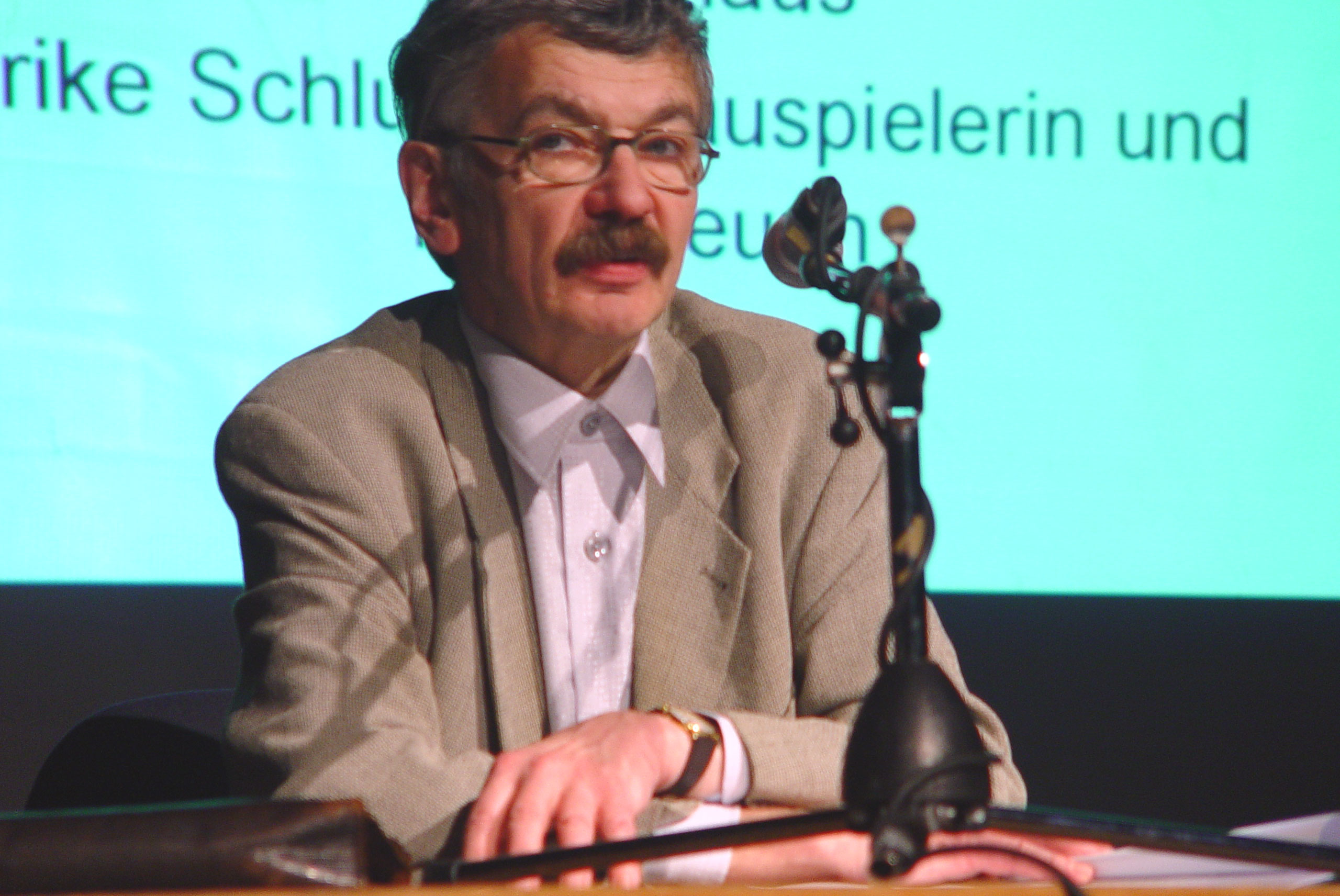 Christoph Hein am 19. Dezember 2004 im Theaterhaus Mitte (Berlin)